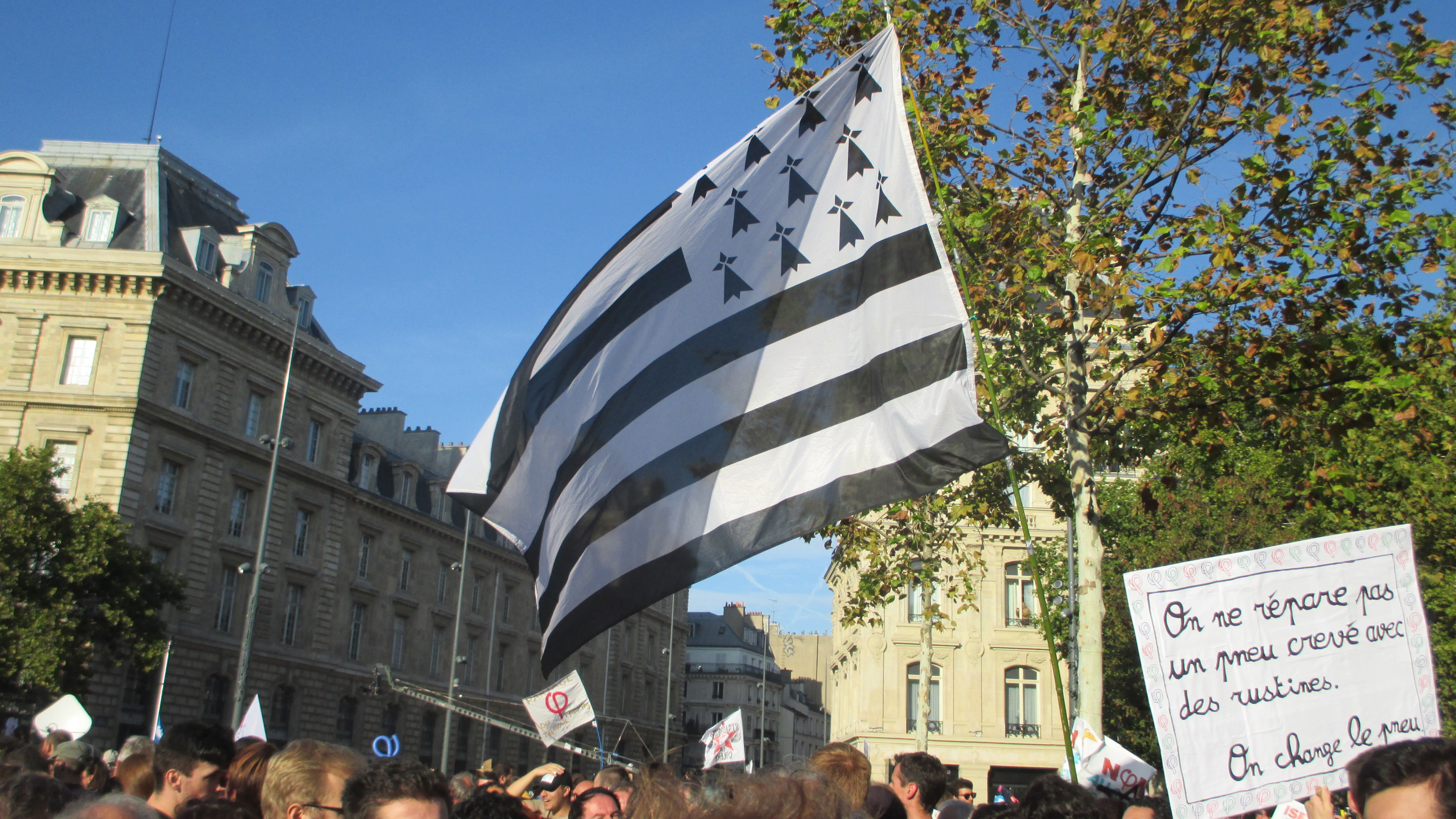 Drapeau breton, place de la République, lors de la marche du 23 septembre 2017 contre le coup d'État social et la politique d'Emmanuel Macron, organisée par La France insoumise.